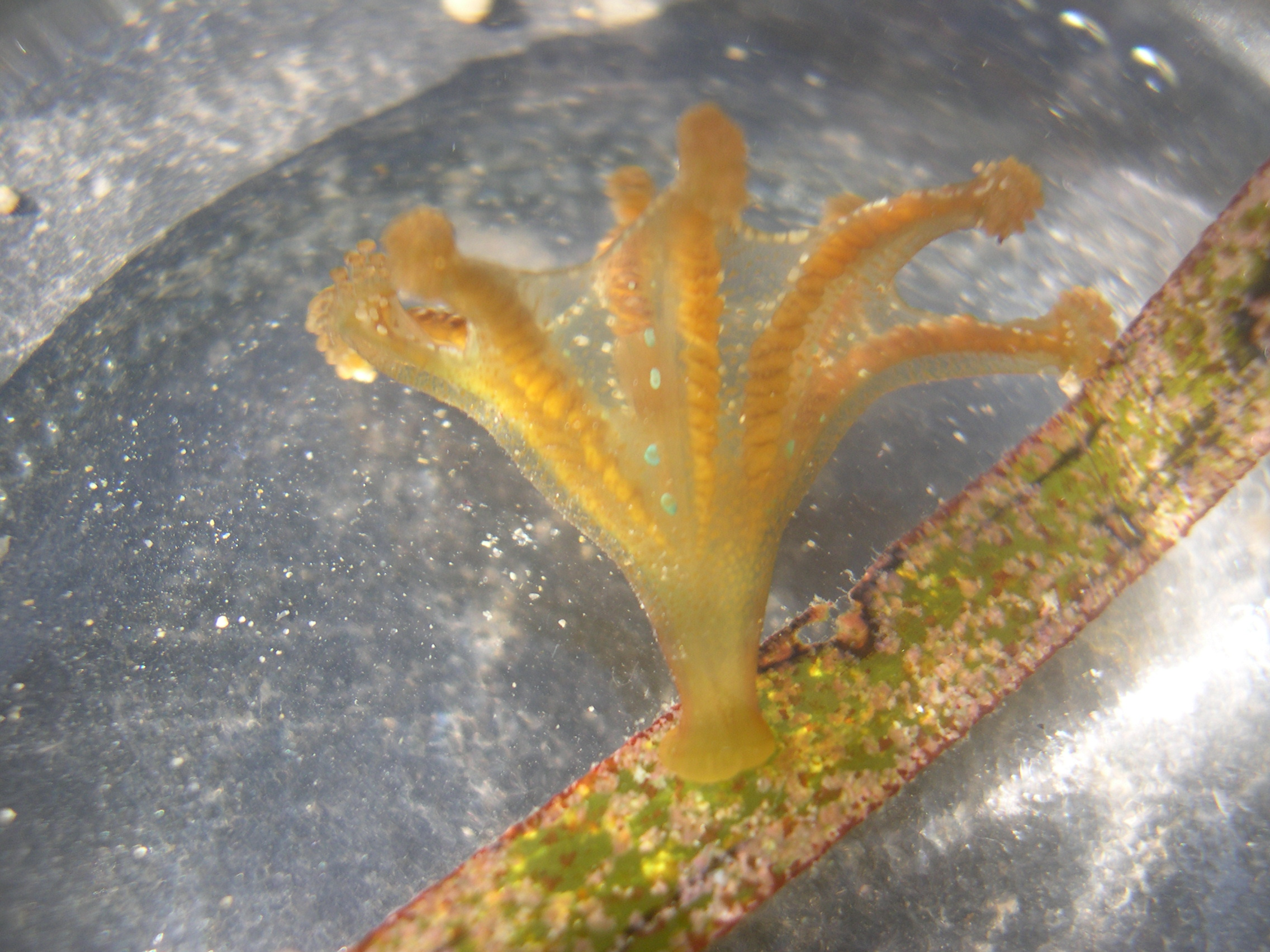 Calvadosia campanulata (à confirmer), sur une feuille de zostère